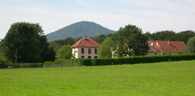 Village de Bourg-sous-Châtelet (Territoire de Belfort) La montagne en fond est "Le Fayé" Photo prise en juillet 2004 par LP90 Copyright : licence GFDL LP90 juillet 2004